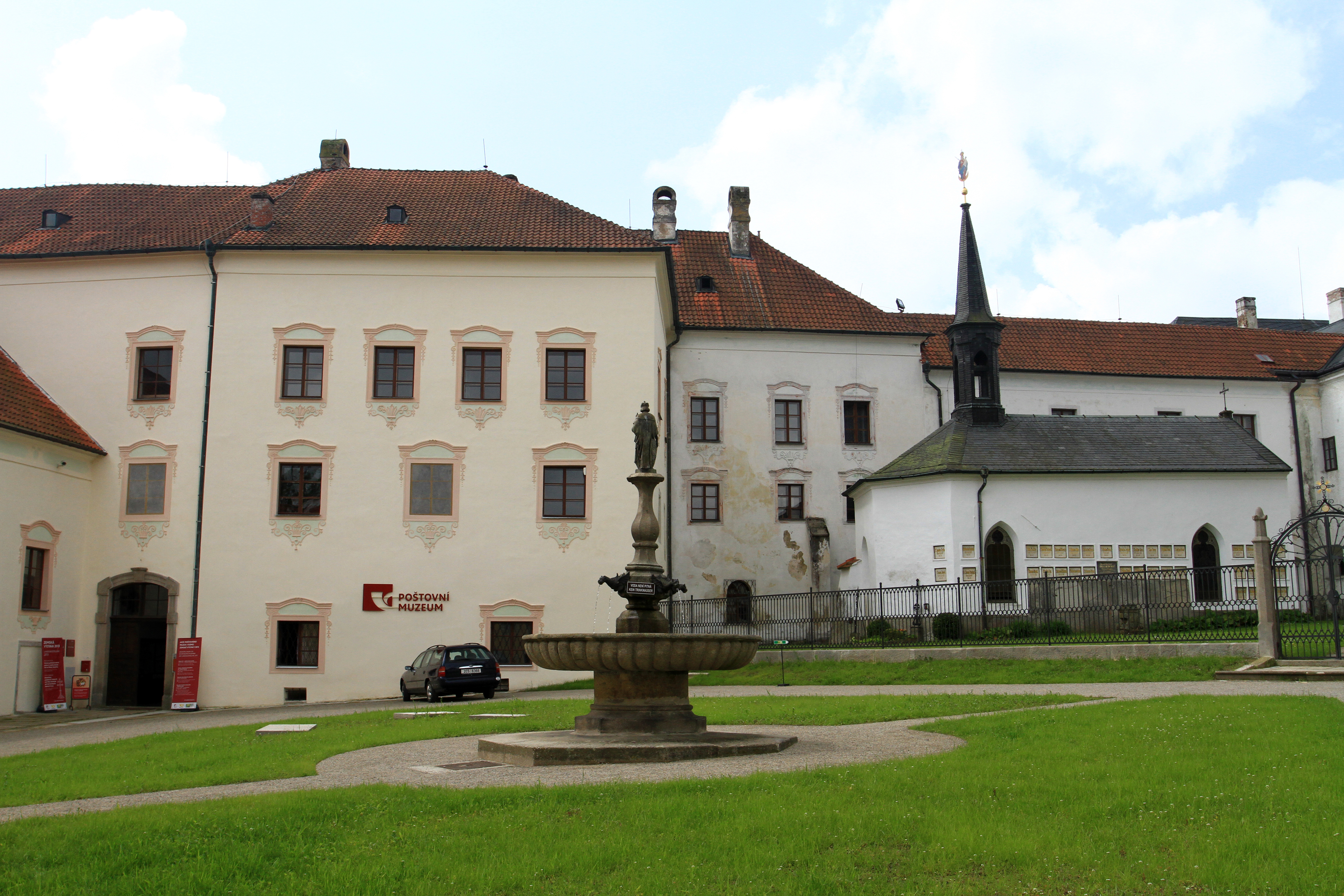 Vyšebrodský klášter (Vyšší Brod, Česká republika) - pohled na Poštovní muzeum a kapli sv. Anny.